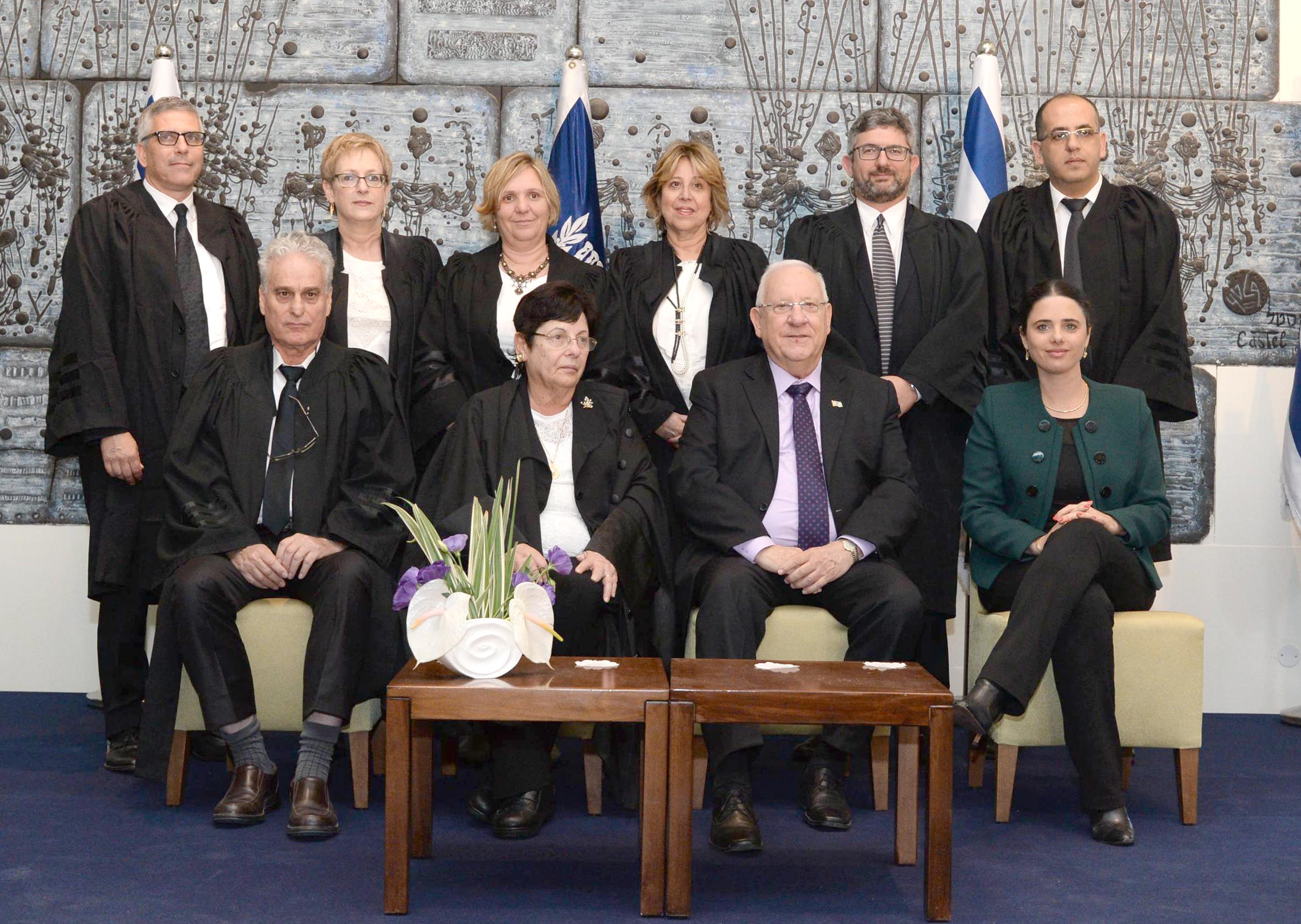 שופטי בית הדין הארצי לעבודה. בישראל. עומדים כאמל אבו קאעוד, אילן איטח, ורדה וירט לבנה, לאה גליקסמן כוכבי [?], רונית רוזנפלד ורועי פוליאק. יושבים מימין לשמאל: שרת המשפטים איילת שקד, נשיא מדינת ישראל ראובן ריבלין, נשיאת בית המשפט העליון מרים נאור, נשיא בית הדין הארצי לעבודה יגאל פליטמן